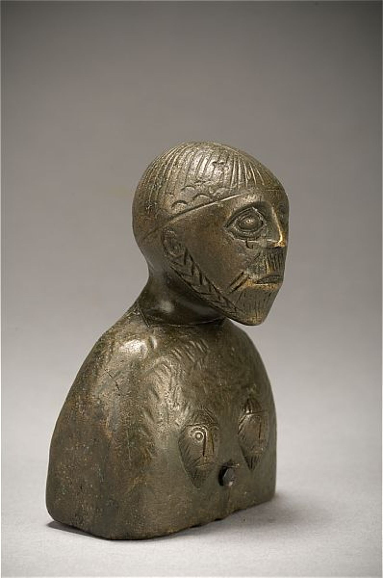 Albökemannen im schwedischen Öland